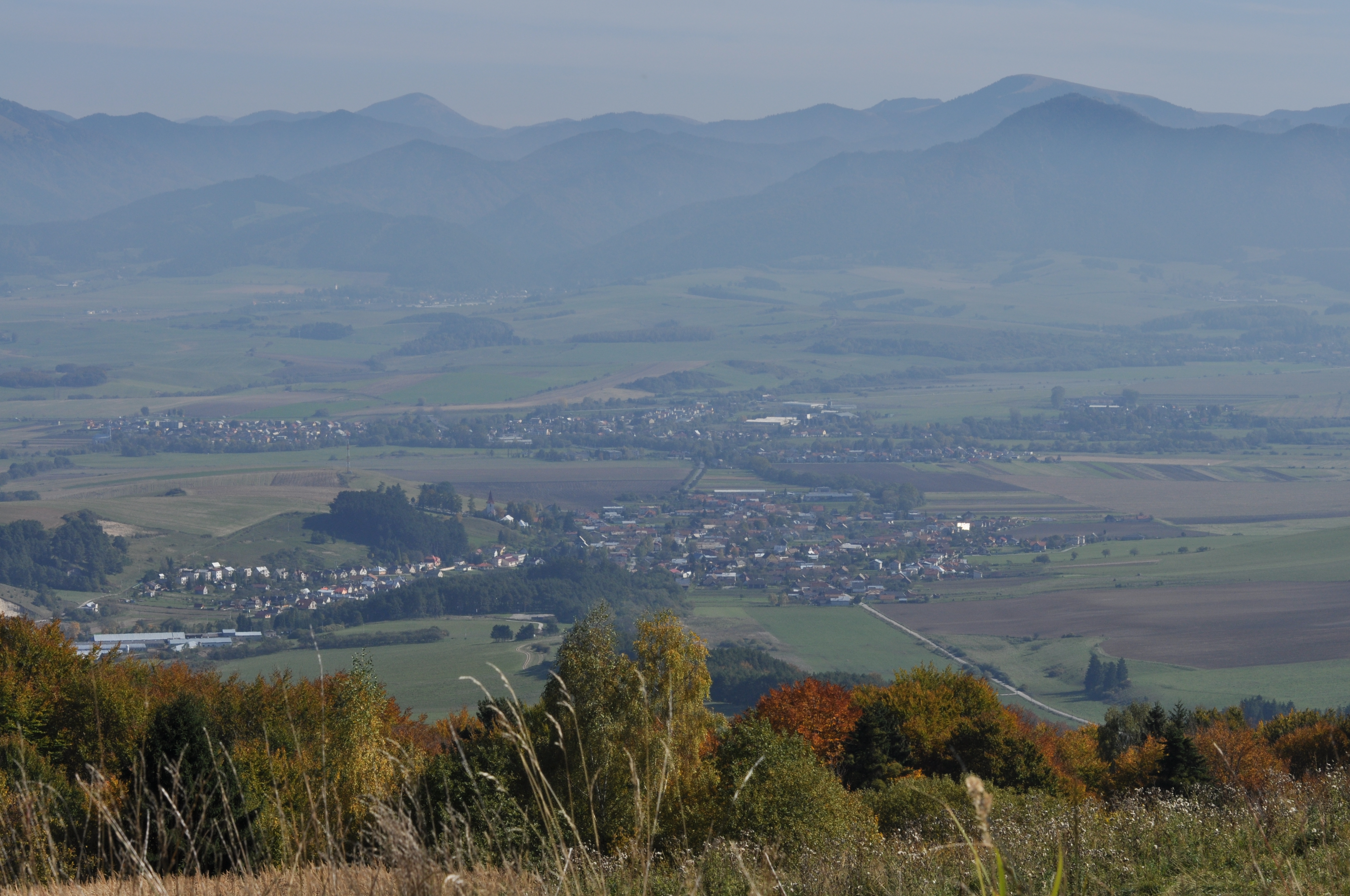 foto z konečnej stanice lanovky v Snowlande